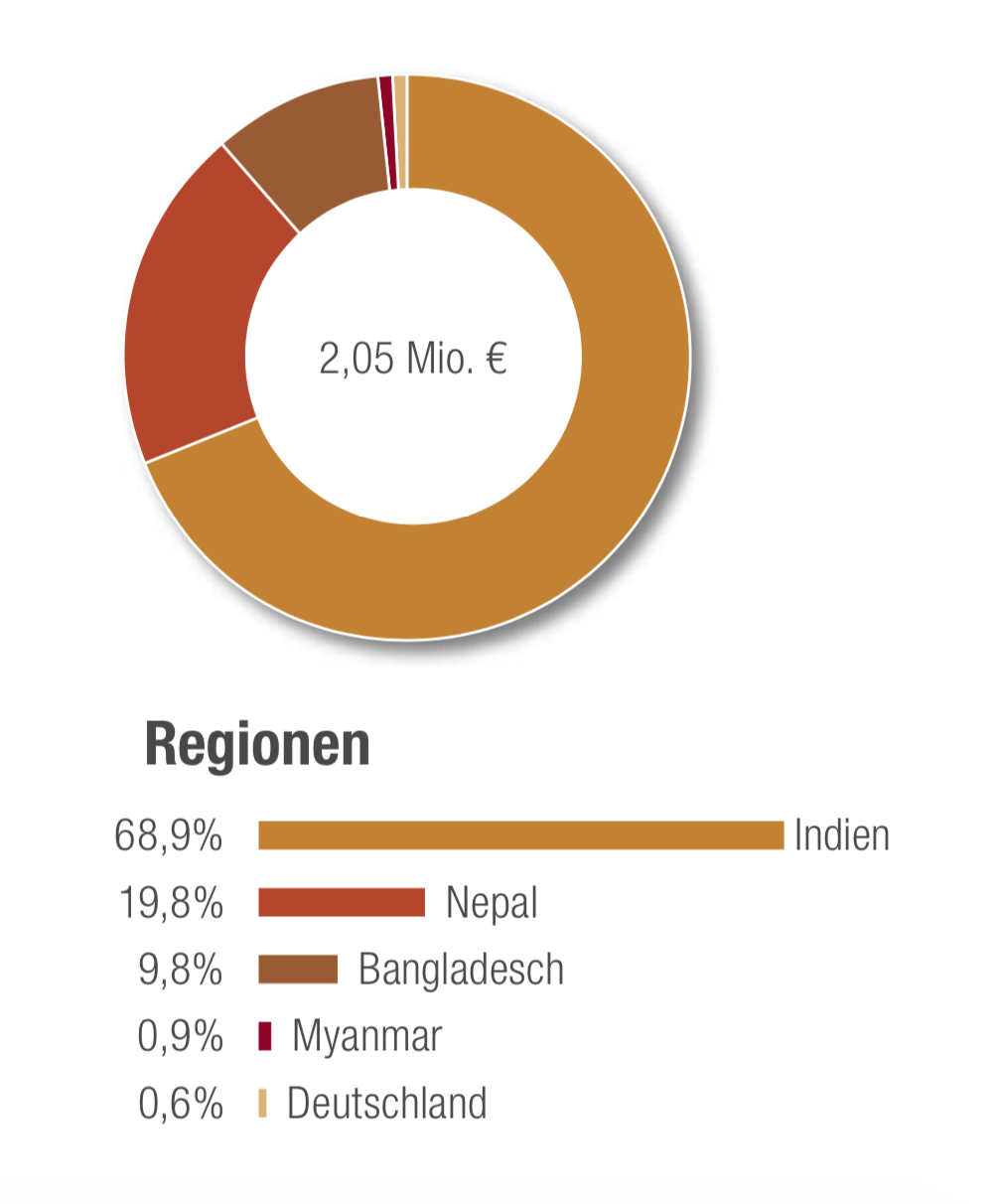 Projektmittel der Stiftung Childaid Network pro Projektregion